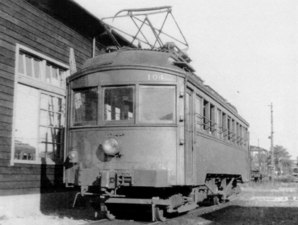 モ100形電車